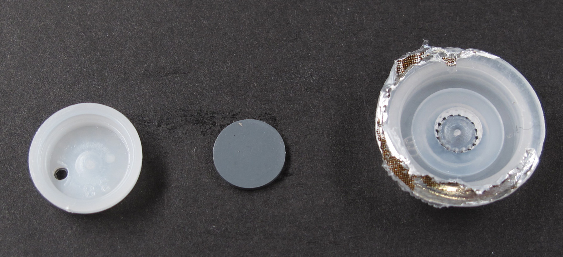 Aromaschutzventil für eine Kaffeeverpackung (zerlegt), bestehend aus zweiteiligem Gehäuse und Dichtscheibe